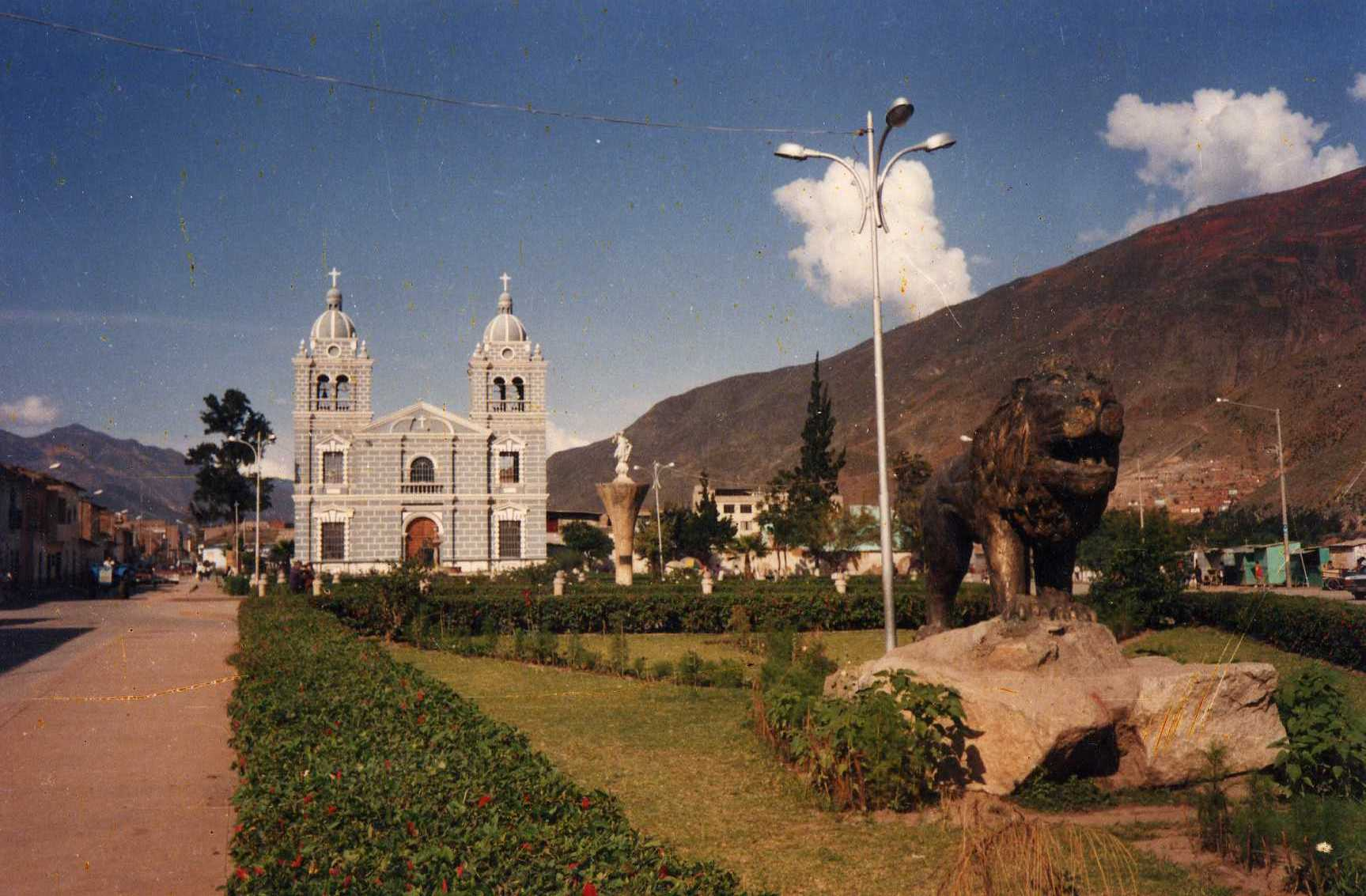 Plaza de Huánuco con la Iglesia de San Sebastian al fondo (Huánuco, Perú).